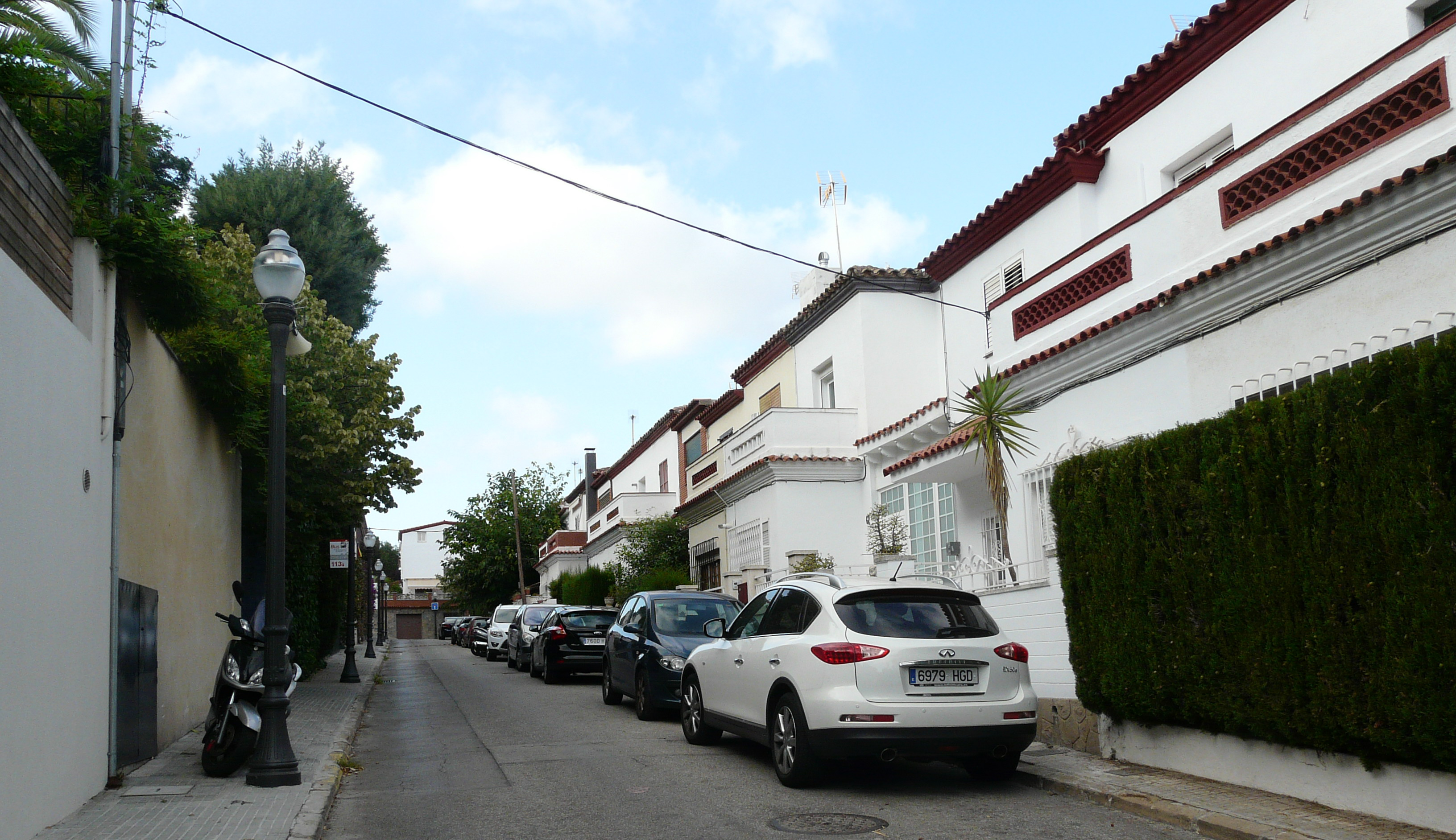 El carrer del Torrent de les Roses, al barri de la Mercè, a Pedralbes, Barcelona.